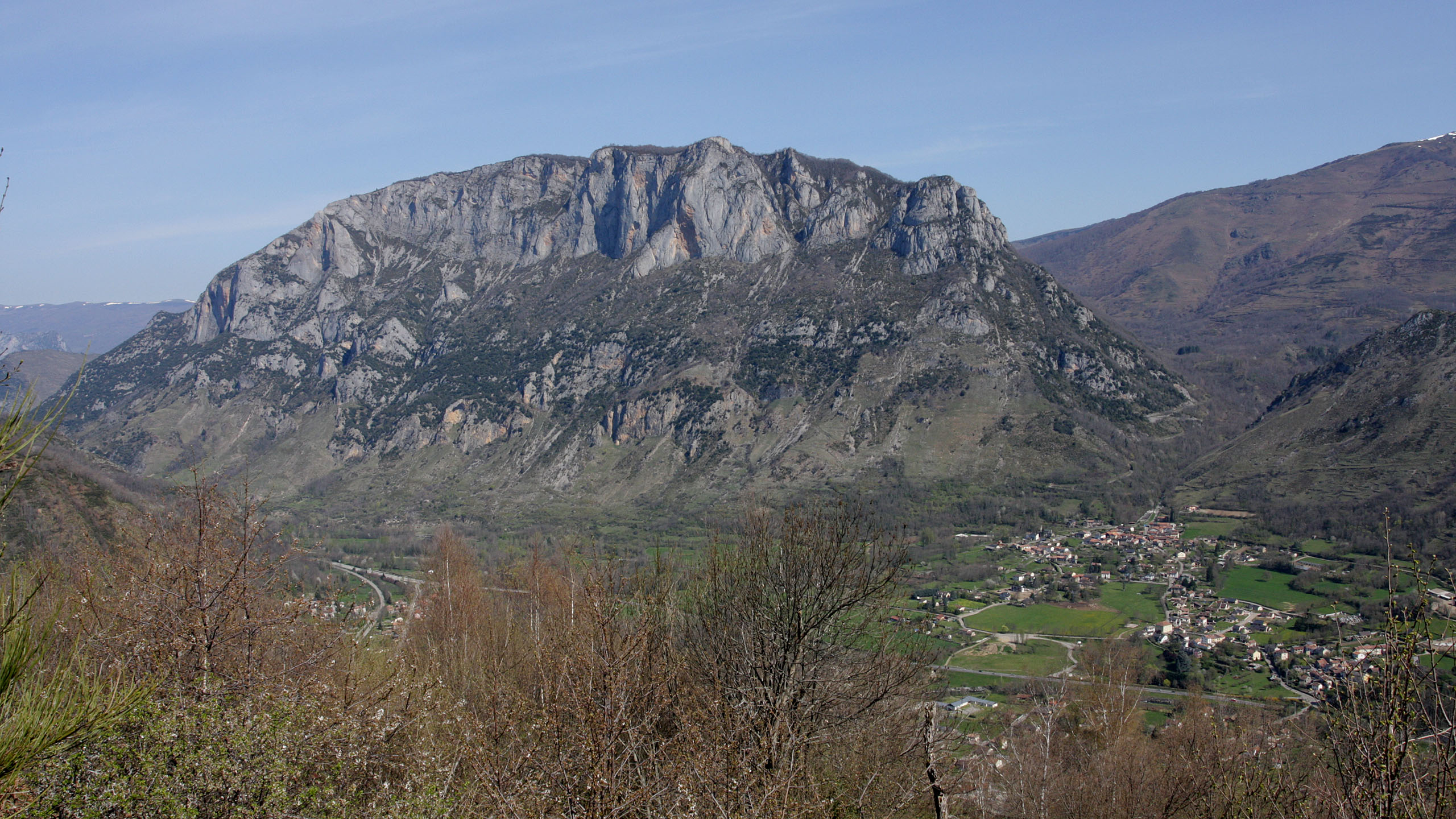 Vue du sud